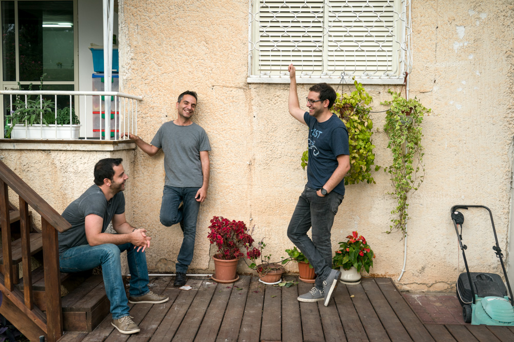 אלף.דלת